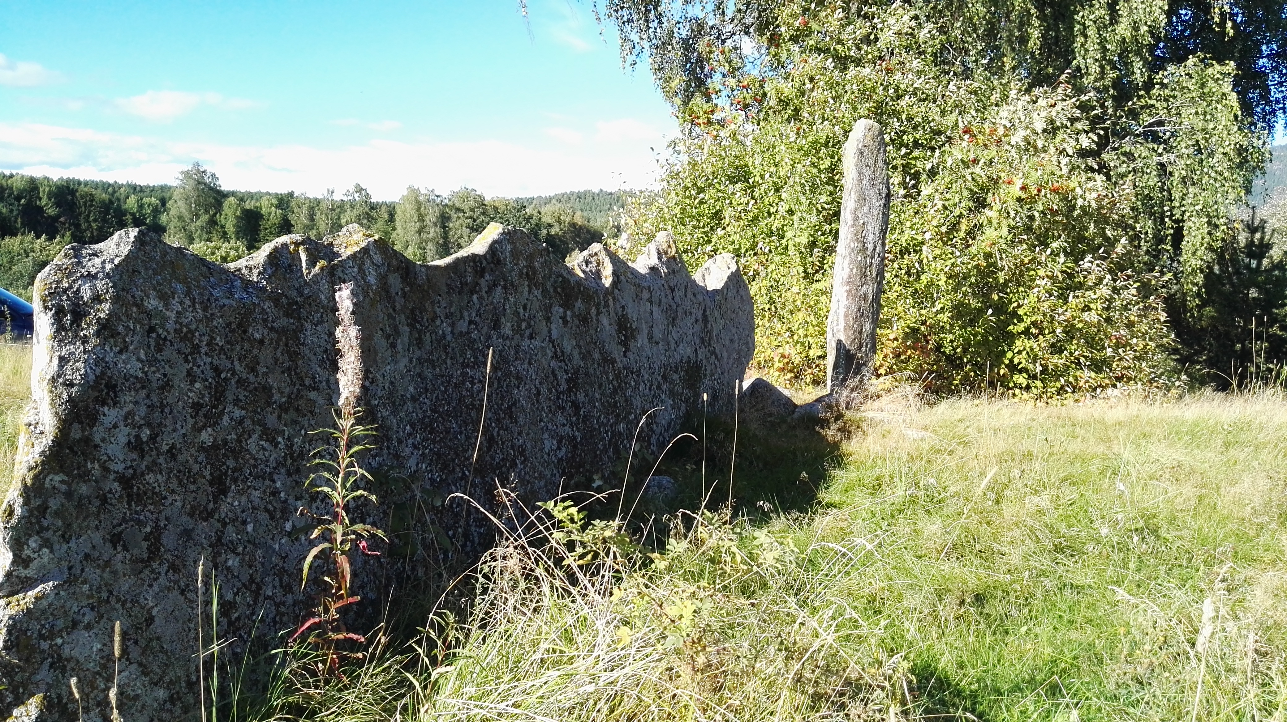 Steinmerra og Gapestokken, Gårahaugen. Fotograf: Karl-Erik Mjaaland Steinsland.